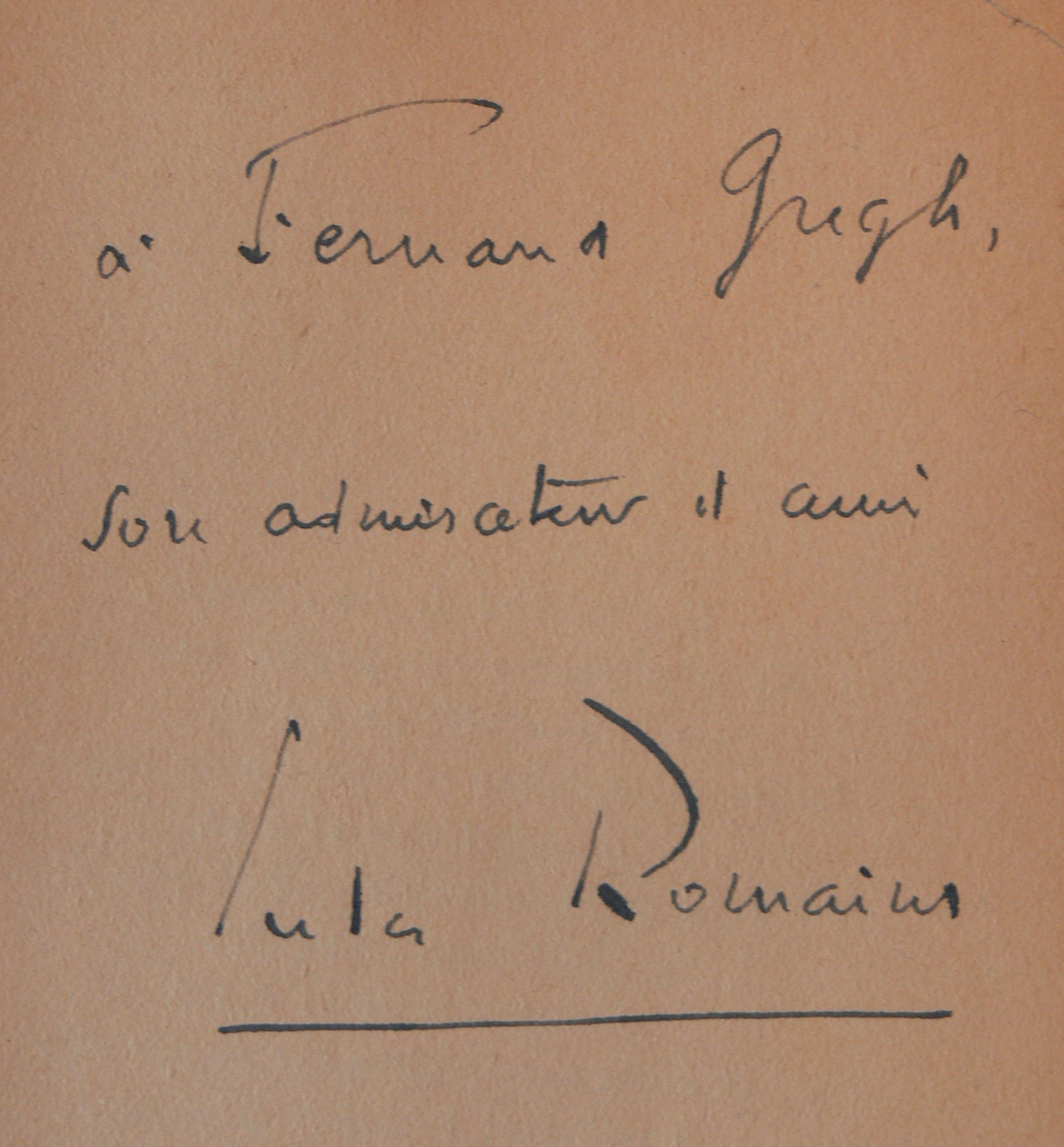 Envoi de Jules Romains